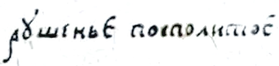 "рүшеньє посполитоє", т. е. посполитое рушение.